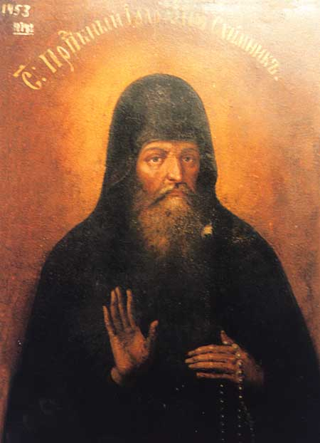 Saint Ilarion, monk of Kyiv Caves, Ukraine. Orthodox saint (died 1006) Іларіон cхимник - ? - бл.1066 р. Чернець Печерського монастиря. Преподобний. Пам'ять 10 вересня і 3 листопада. Монастирська традиція вважає цього Іларіона ченцем, що жив за часів ігумена Феодосія (1062-1074) і був книгописцем, "дни и нощи писаше книги в келии у блаженнаго отца нашего Феодосия". У "Патерику Печерському" Іларіон про самого себе оповідає, як щоночі до нього приходили біси і, схопивши за волосся, починали тягнути. Не в силах терпіти такі страждання, він сказав про них ігуменові Феодосію і хотів перейти жити до іншої келії. Однак прп.Феодосій переконав його залишитися на тому ж місці й своїми молитвами заборонив бісам докучати Іларіону. Згідно з іншою гіпотезою, за цим ім'ям ховається колишній митрополит Київський Іларіон (1051-1054), який не має у святцях архієрейського титула тільки тому, що аж до пізнього середньовіччя угодники Дальніх печер були місцево шанованими й обставини їхнього церковного служіння забулися. Мощі преподобного Іларіона спочивають у Дальніх печерах.